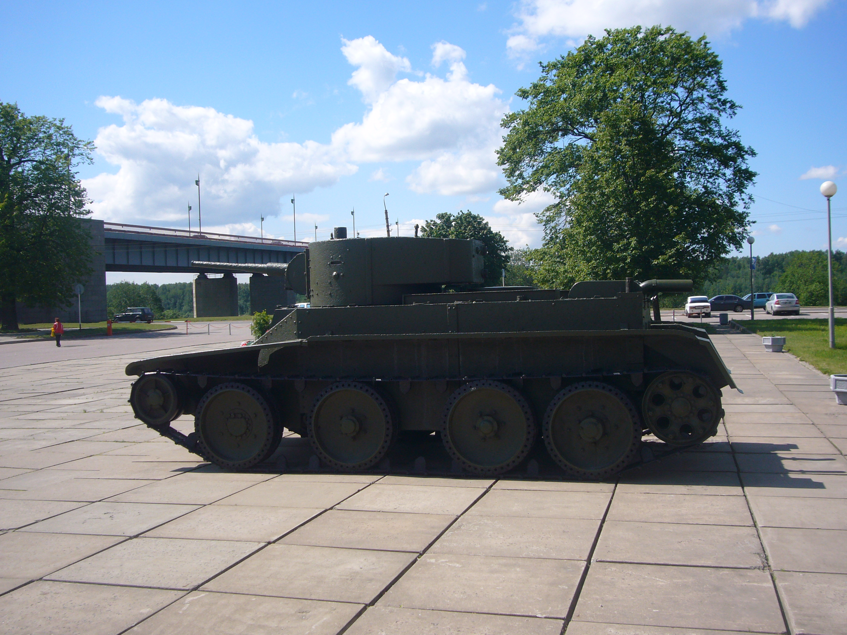 БТ-5 у диорамы «Прорыв блокады Ленинграда». Вид слева.